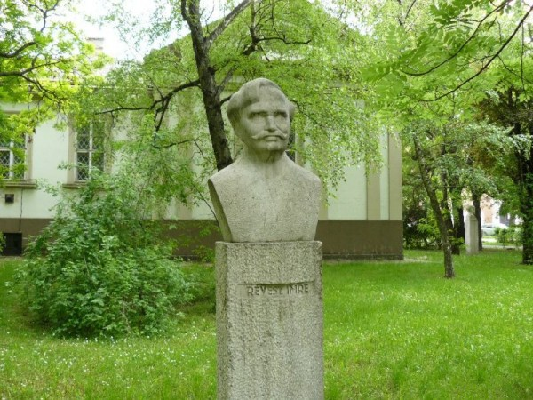 Révész Imre festőművész, grafikusról készült mellszobor, Ács József szobrász alkotása. Felállítva 1968-ban Kecskeméten a Kodály Zoltán téren.